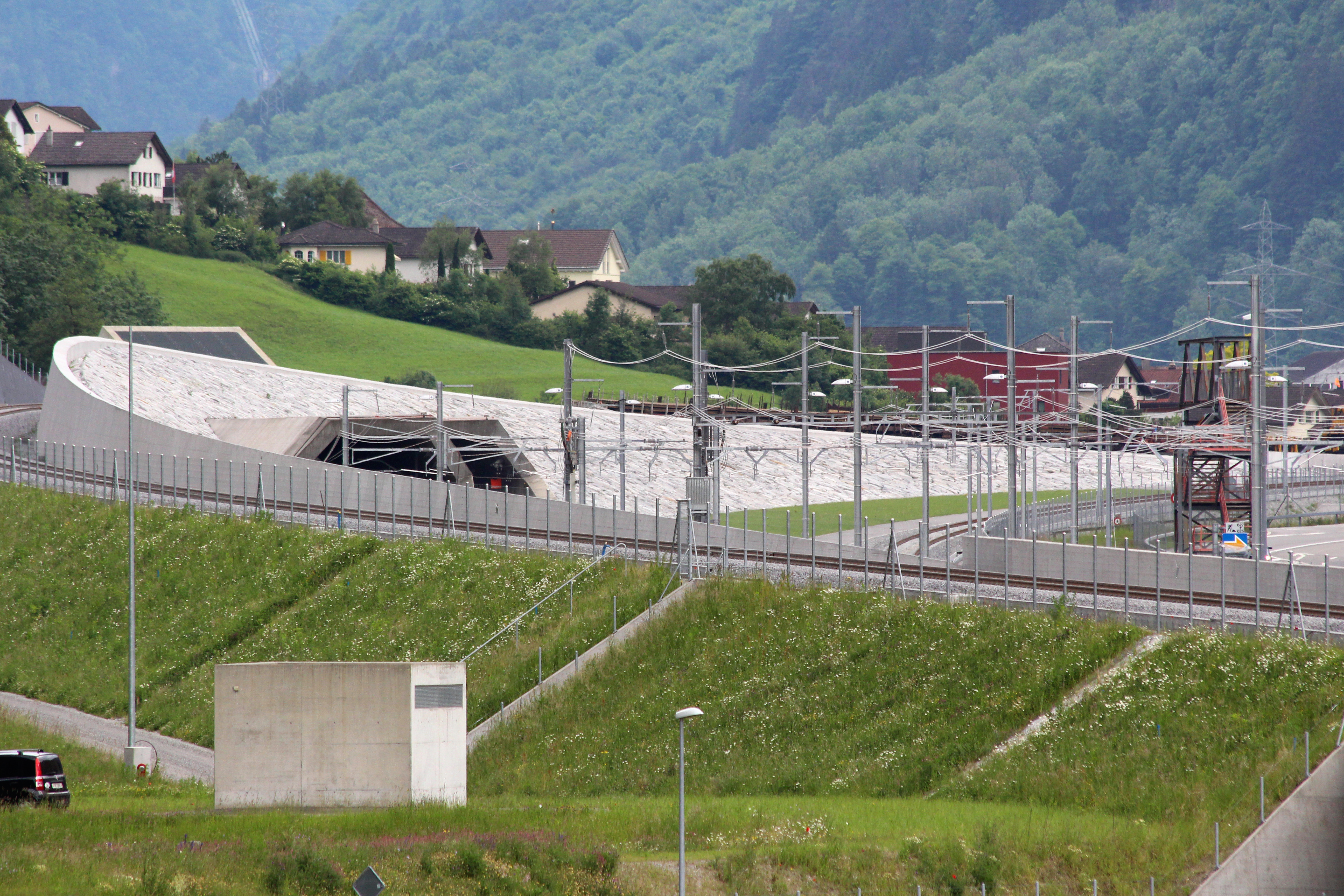 AlpTransit NEAT - Baustelle Erstfeld UR